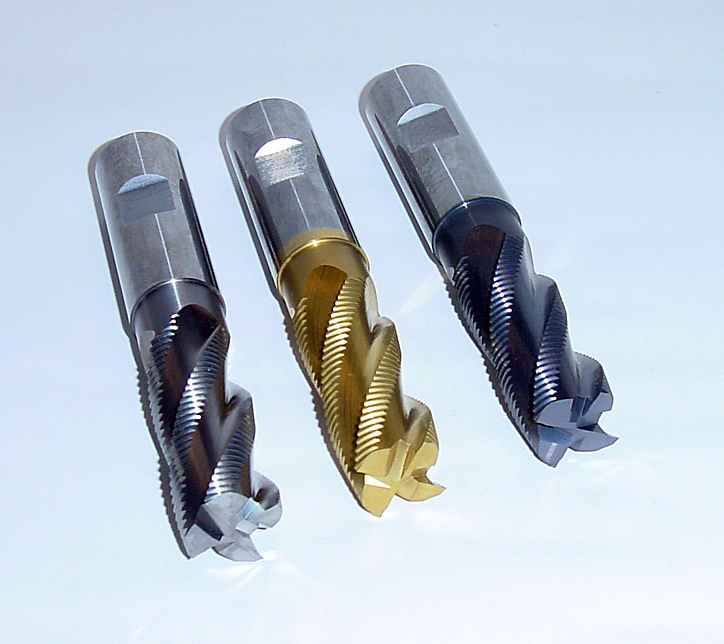 Schaftfräser mit Schruppverzahnung mit unterschiedlichen Beschichtungen